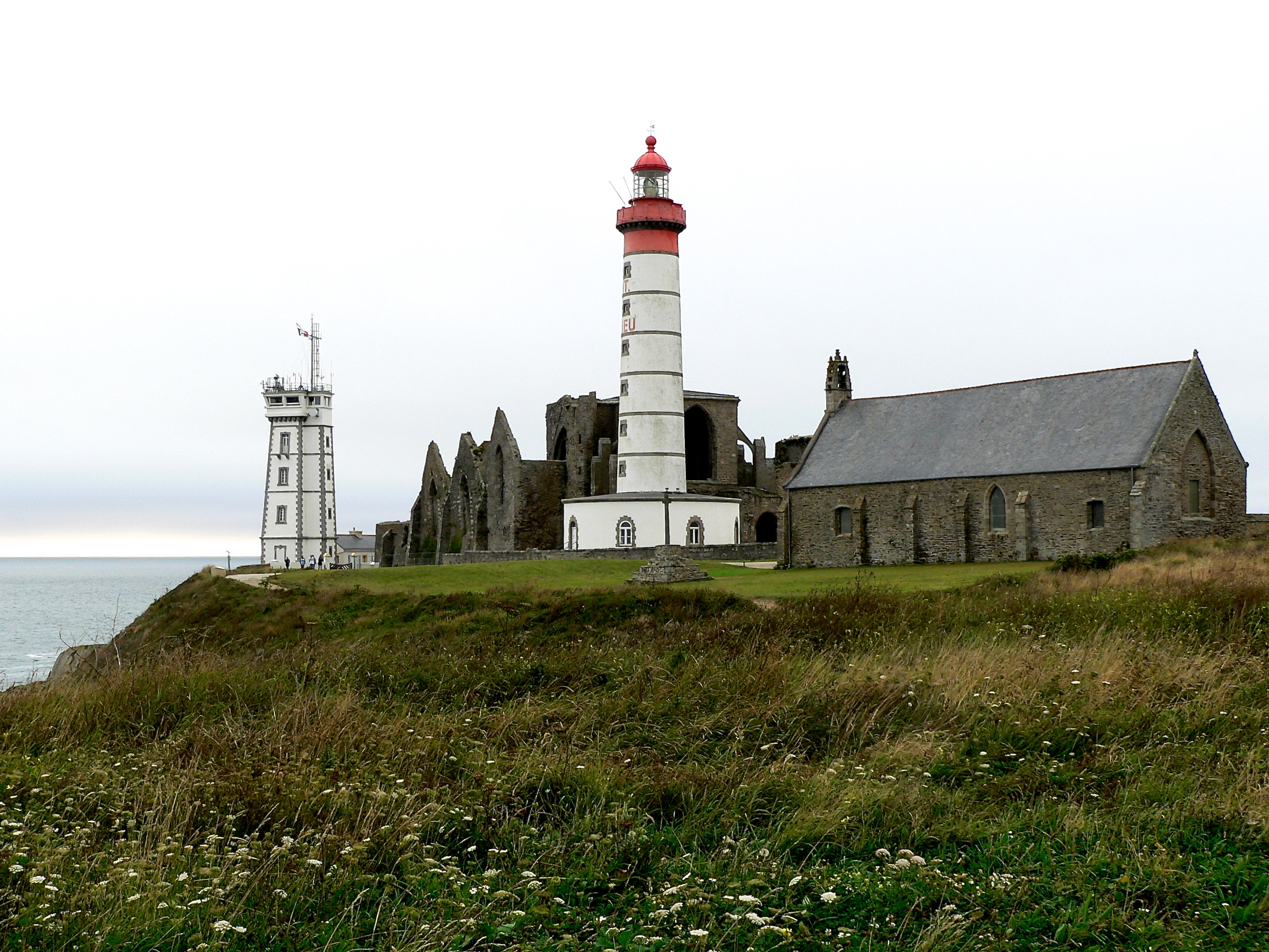 Phare et abbaye de la pointe Saint-Mathieu ; chapelle Notre-Dame-des-Grâces .